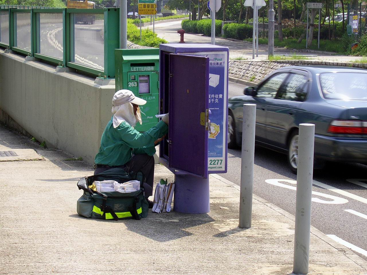 郵差從儲存筒取郵件安排派遞